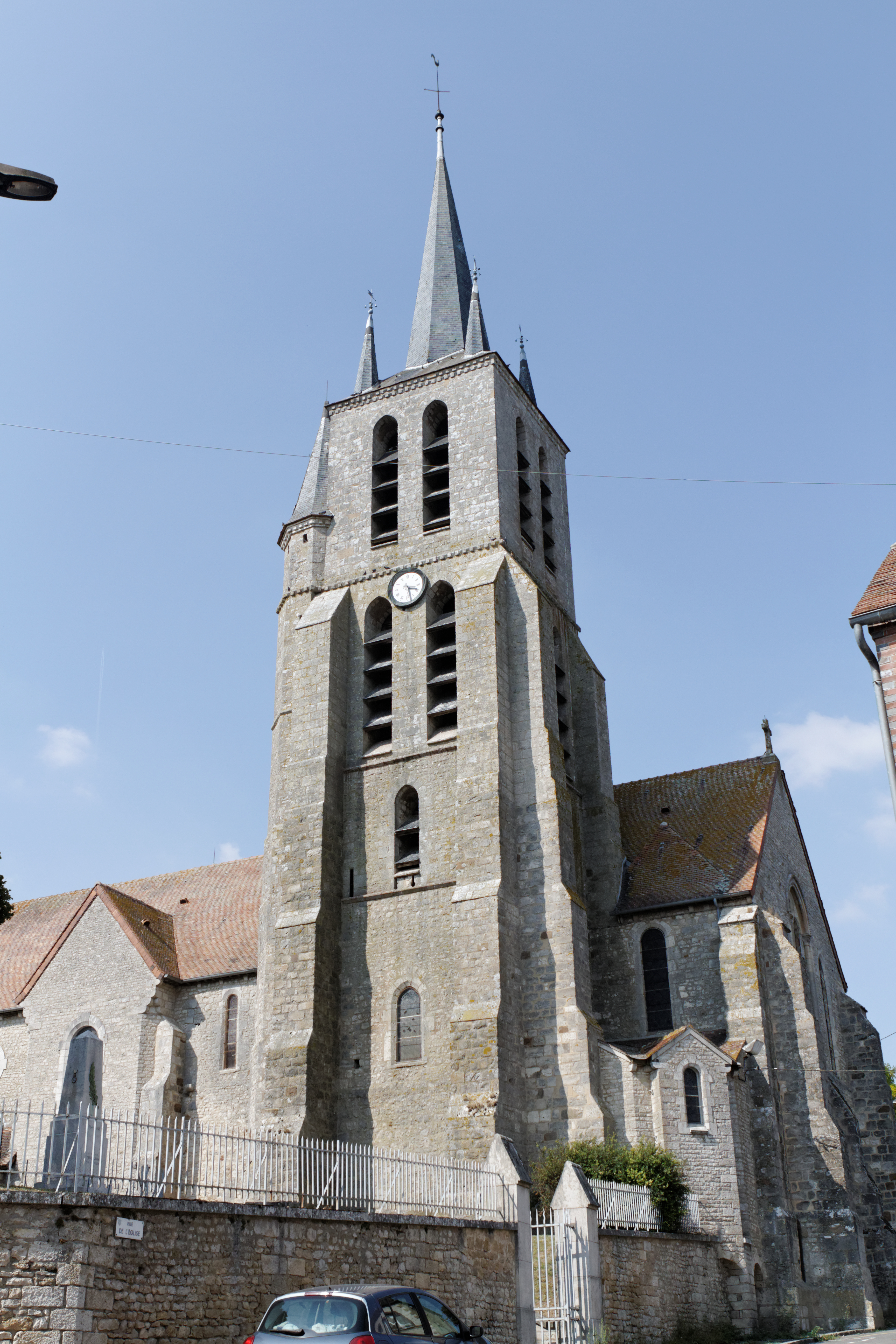 Église Sainte-Anne de Lorrez-le-Bocage, Lorrez-le-Bocage (Inscrit, 1926)